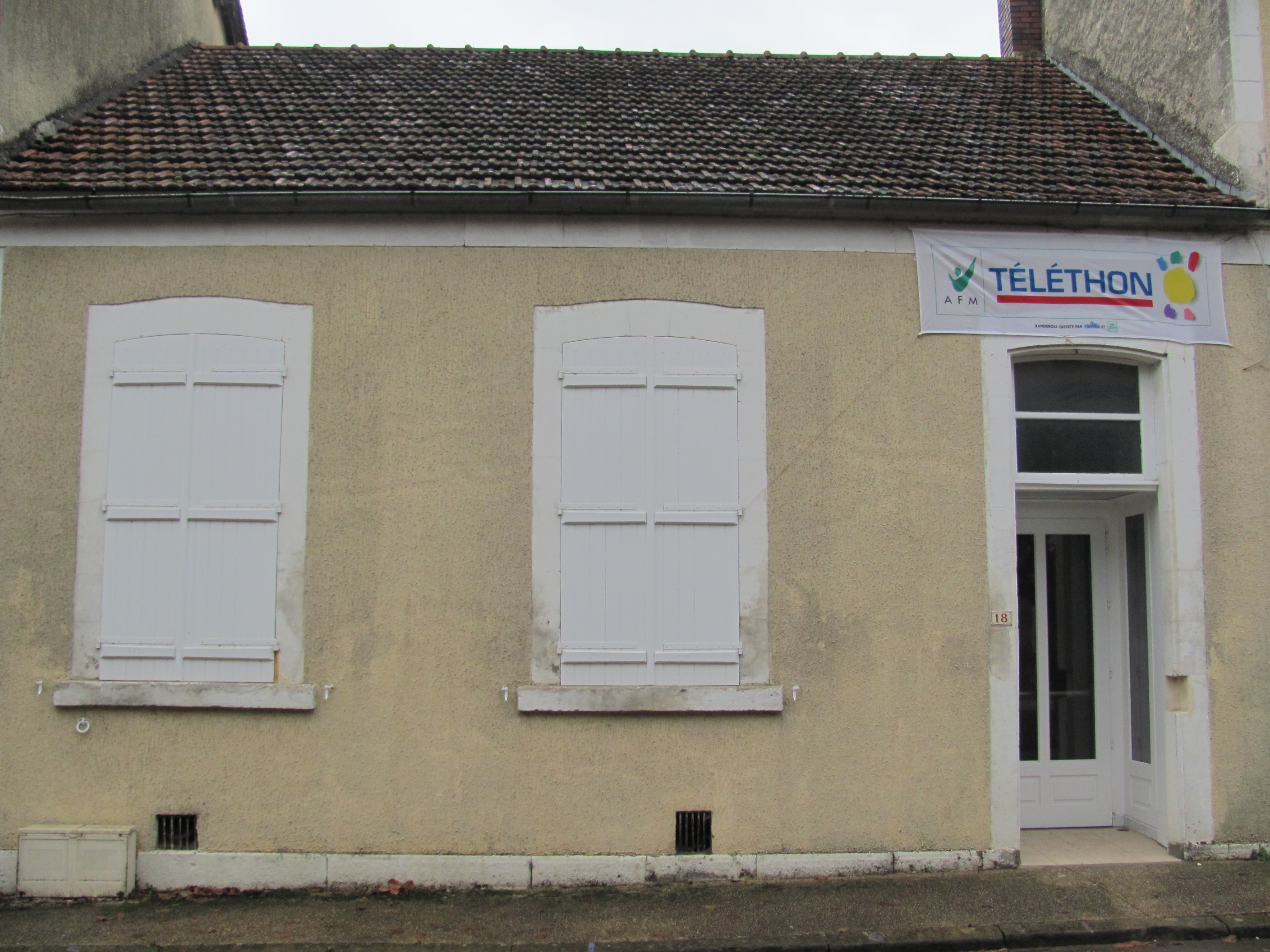 Salle des fêtes de Sougères-en-Puisaye.